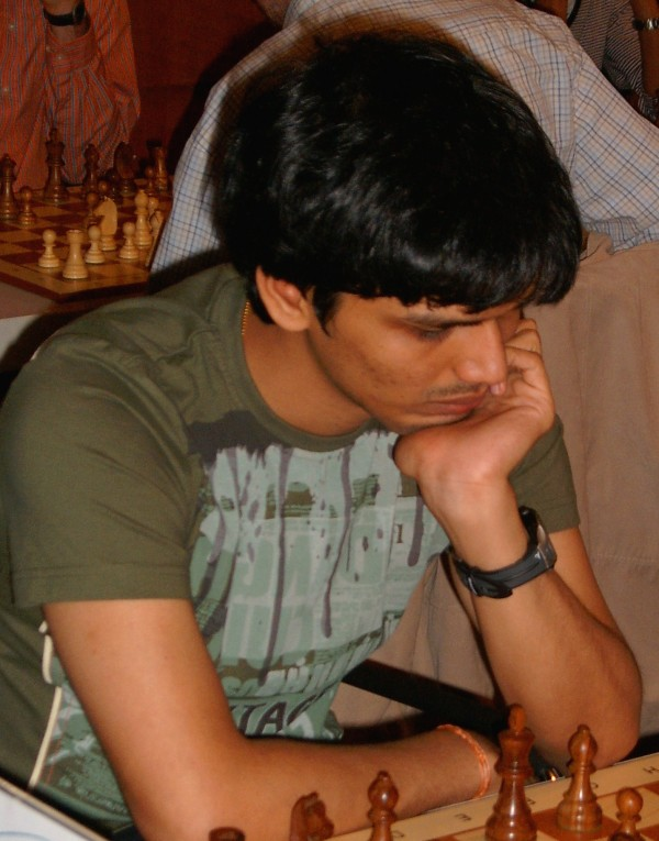 P. Harikrishna (Pentala Harikrishna), Indian chess grandmaster